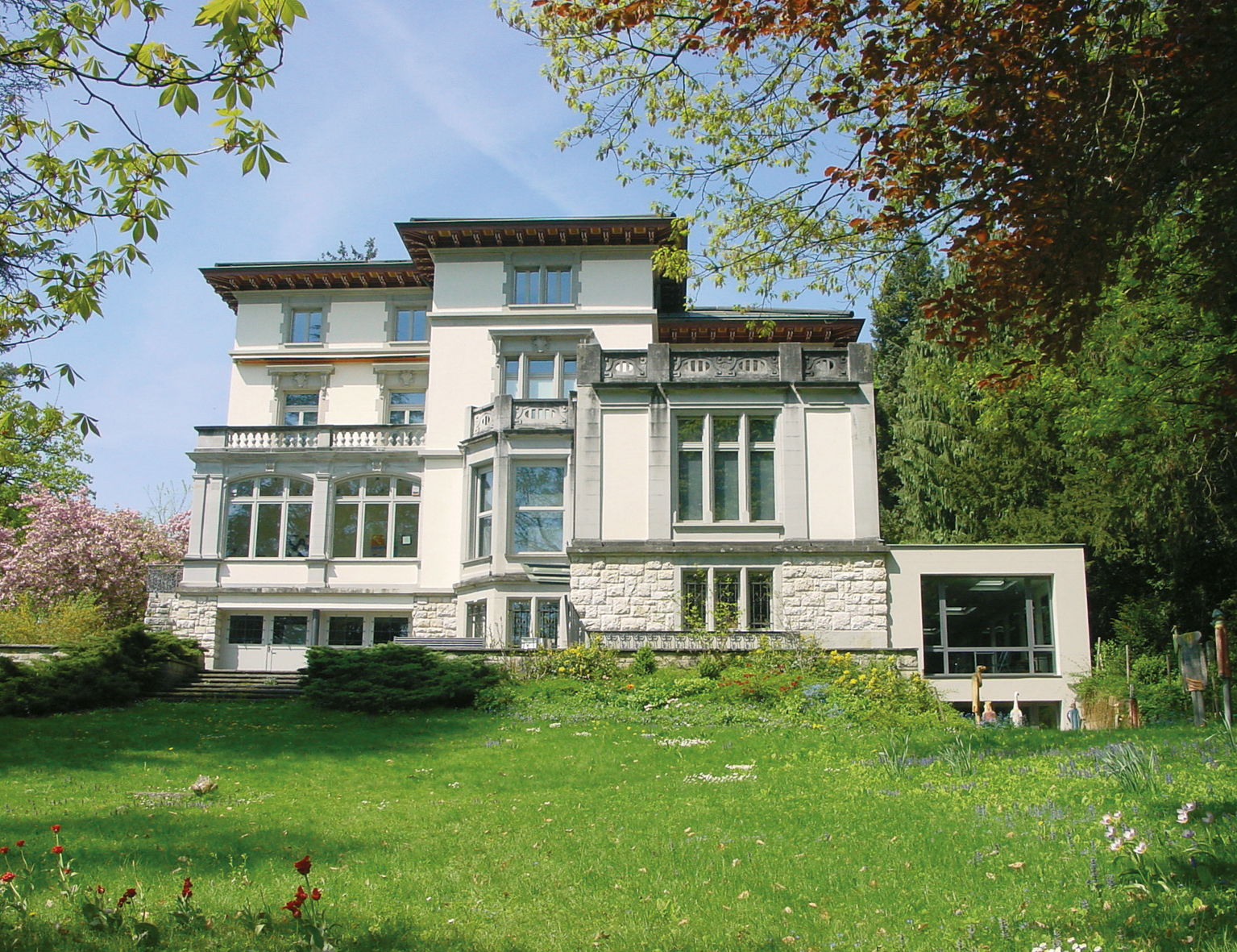 Villa aus dem Jahre 1896 97 von den Architekten Dorer und Fuechslin gebaut